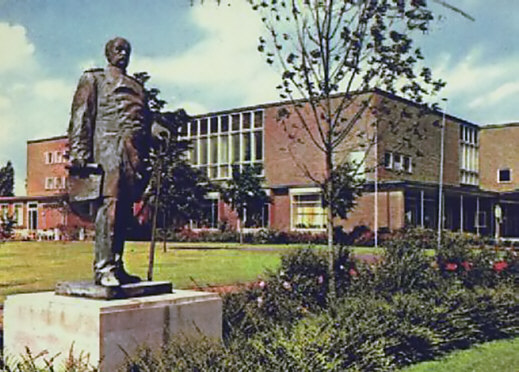 Bismarck-Denkmal Dueren